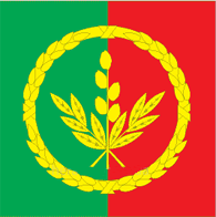 Flag of Rokytnyanskyi Raion Kyiv Ukraine